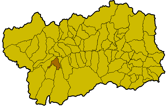 Locatie Introd